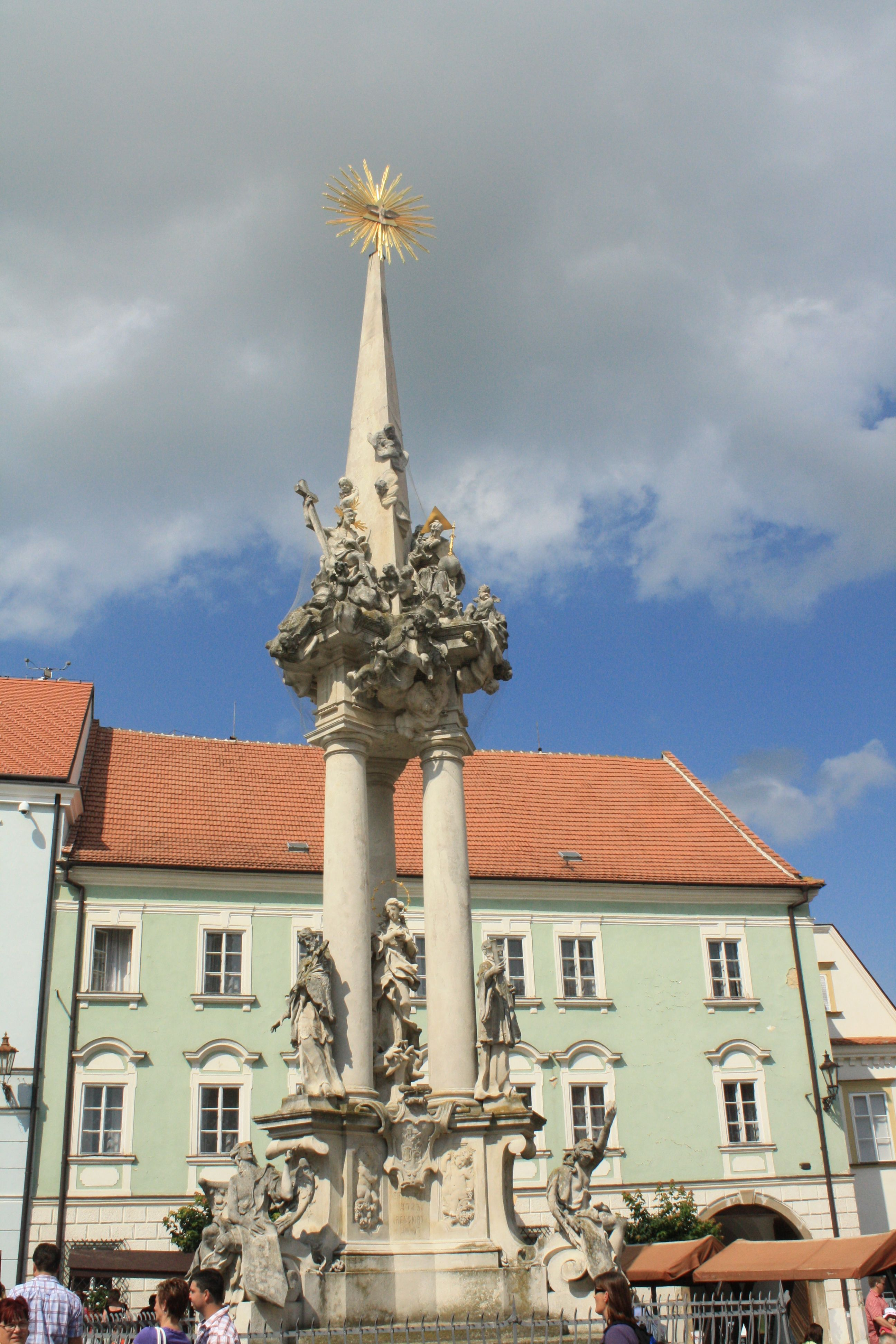 Mikulov Hauptplatz mit Dreifaltigkeitssäule